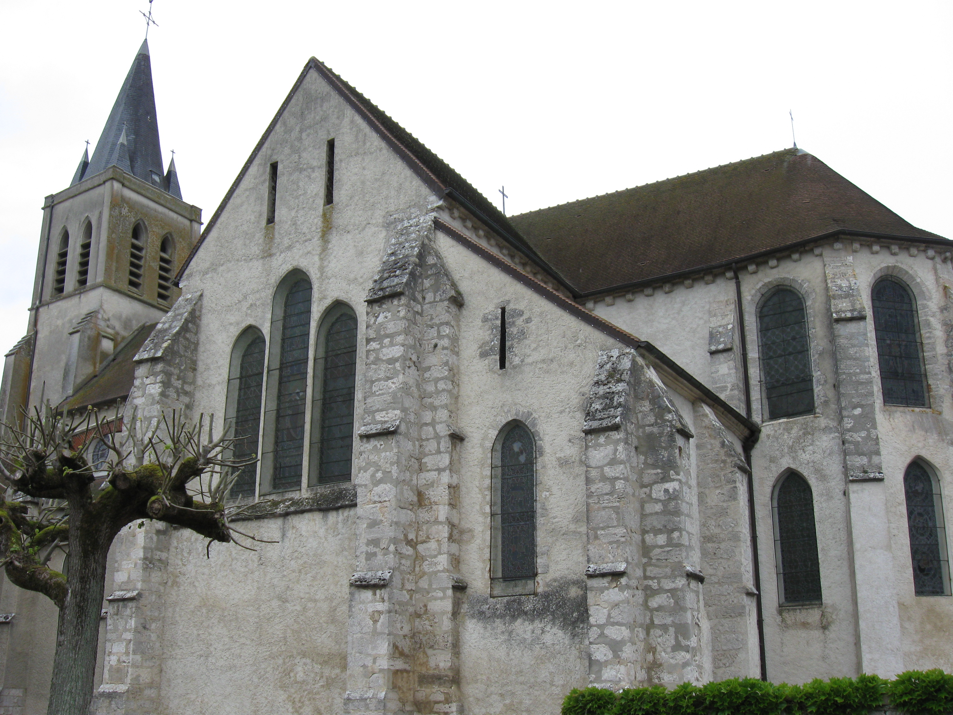 Église Saint-Georges de Guérard. (Seine-et-Marne, région Île-de-France).